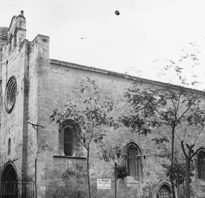 Església romànica de Vilafranca del Penedès. Josep Salvany i Blanch (1913)